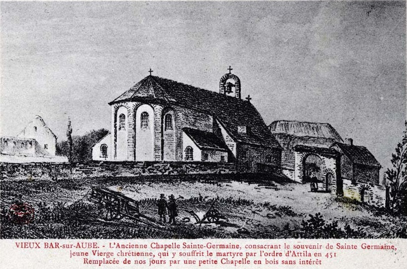 vue de cf titre.